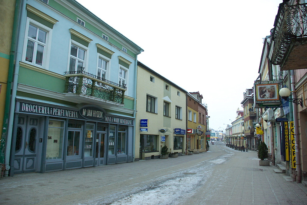 Sklep Hydzika 3 Maja Sanok